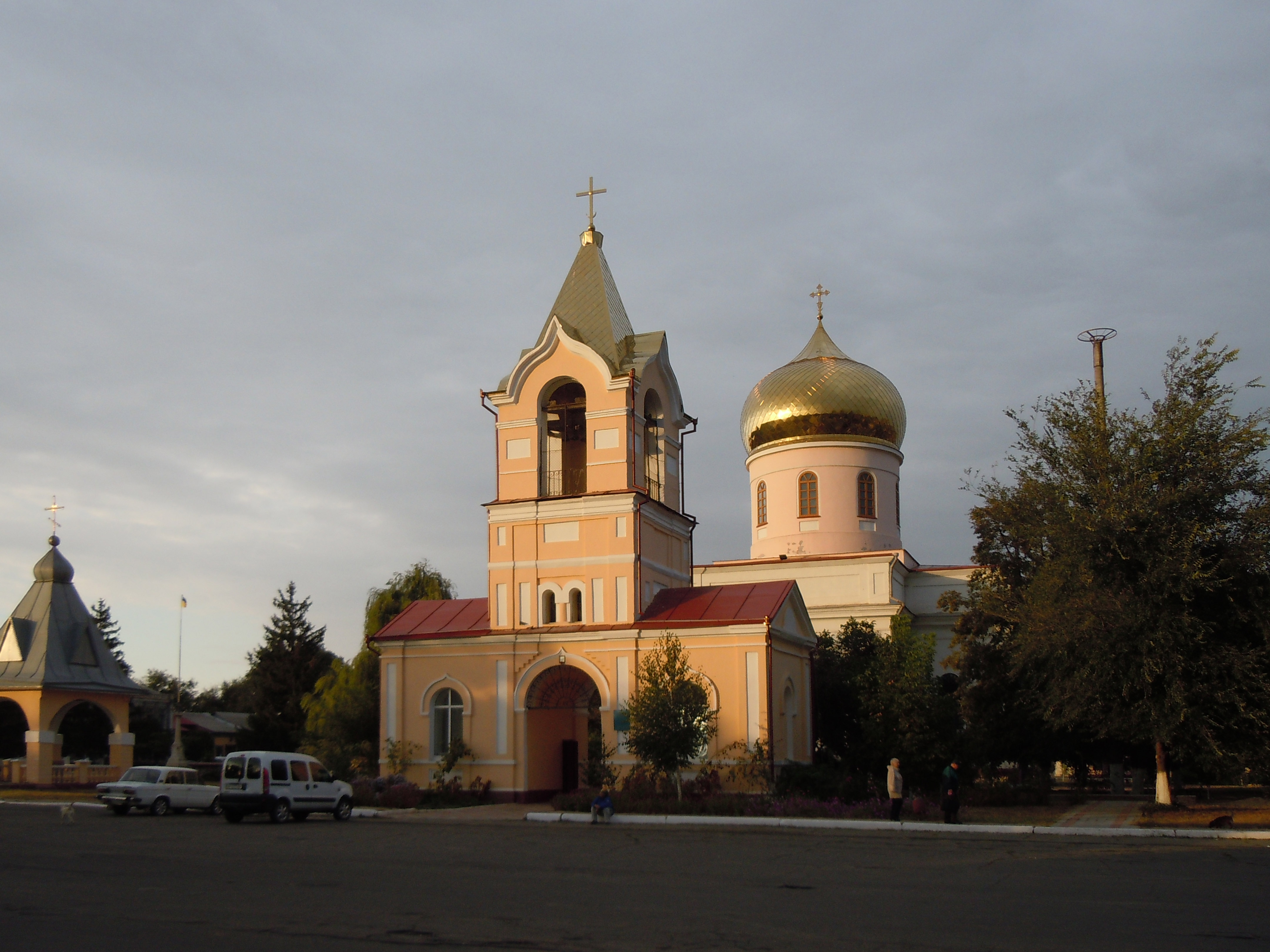 Свято-Вознесенський собор, Рені, пл. Свободи